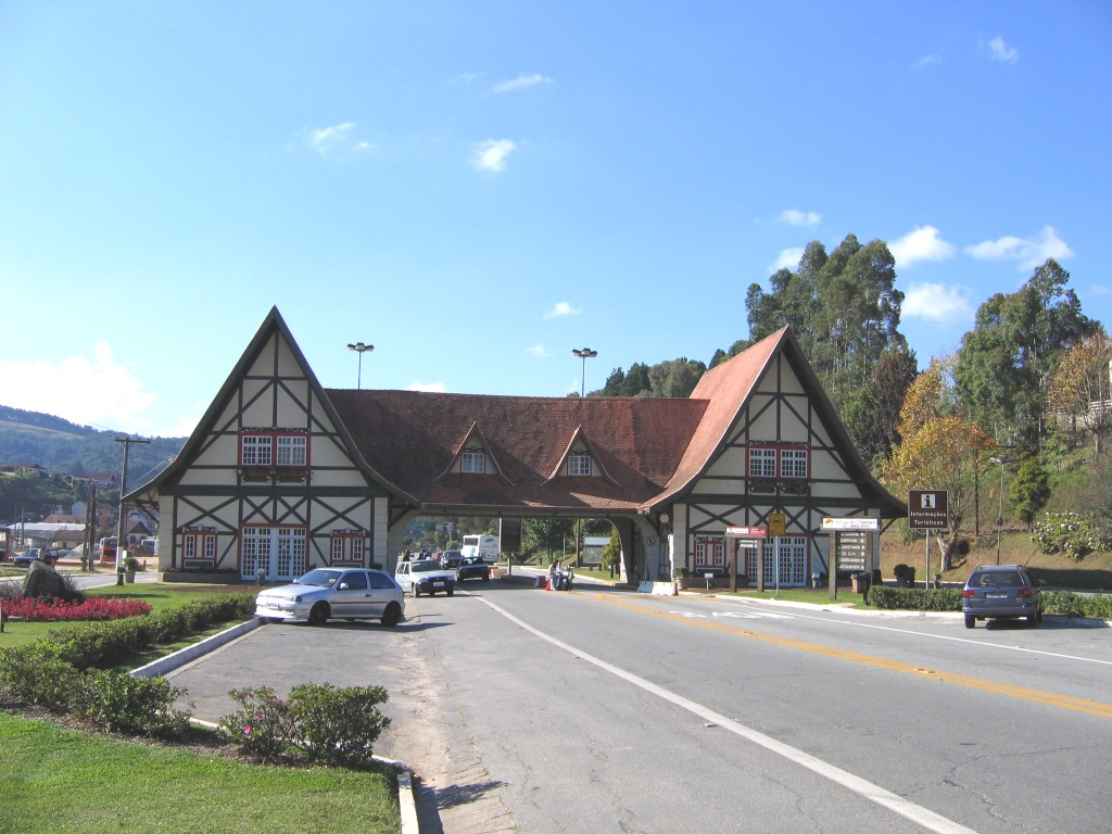 Portal de entrada de Campos do Jordão